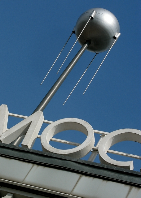 Berlin Cafe Moskau Sputnik